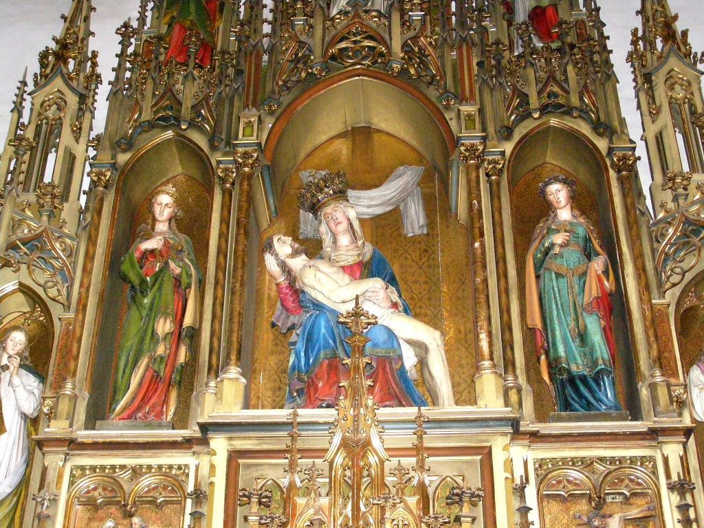 Detail z oltára - v strede Panna Mária s ukrižovaným Kristom, po stranách sochy svätíc - vľavo sv. Agnesa, vpravo sv. Helena